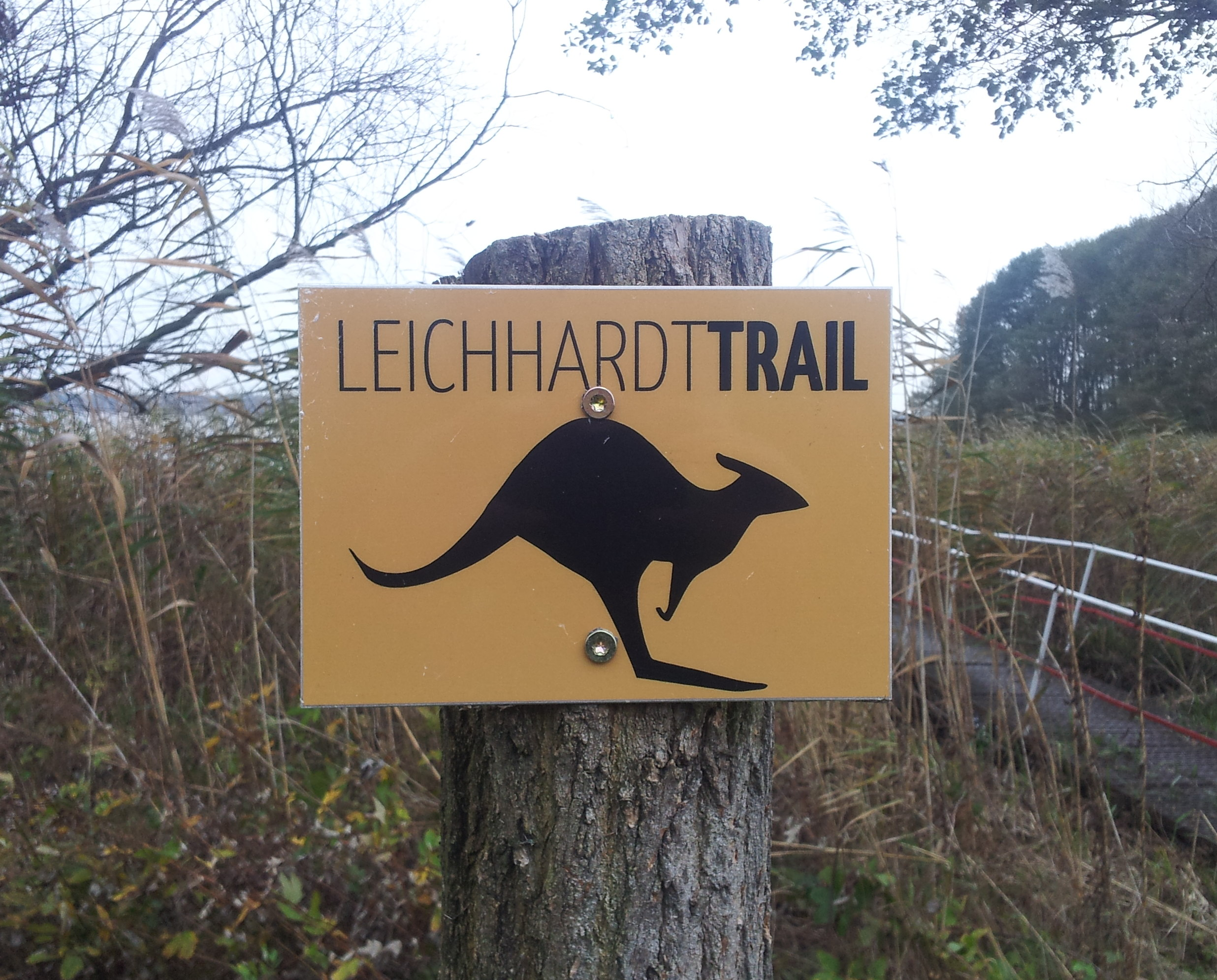 Hinweisschild auf den Leichhardt Trail am Schwielochsee in Zaue